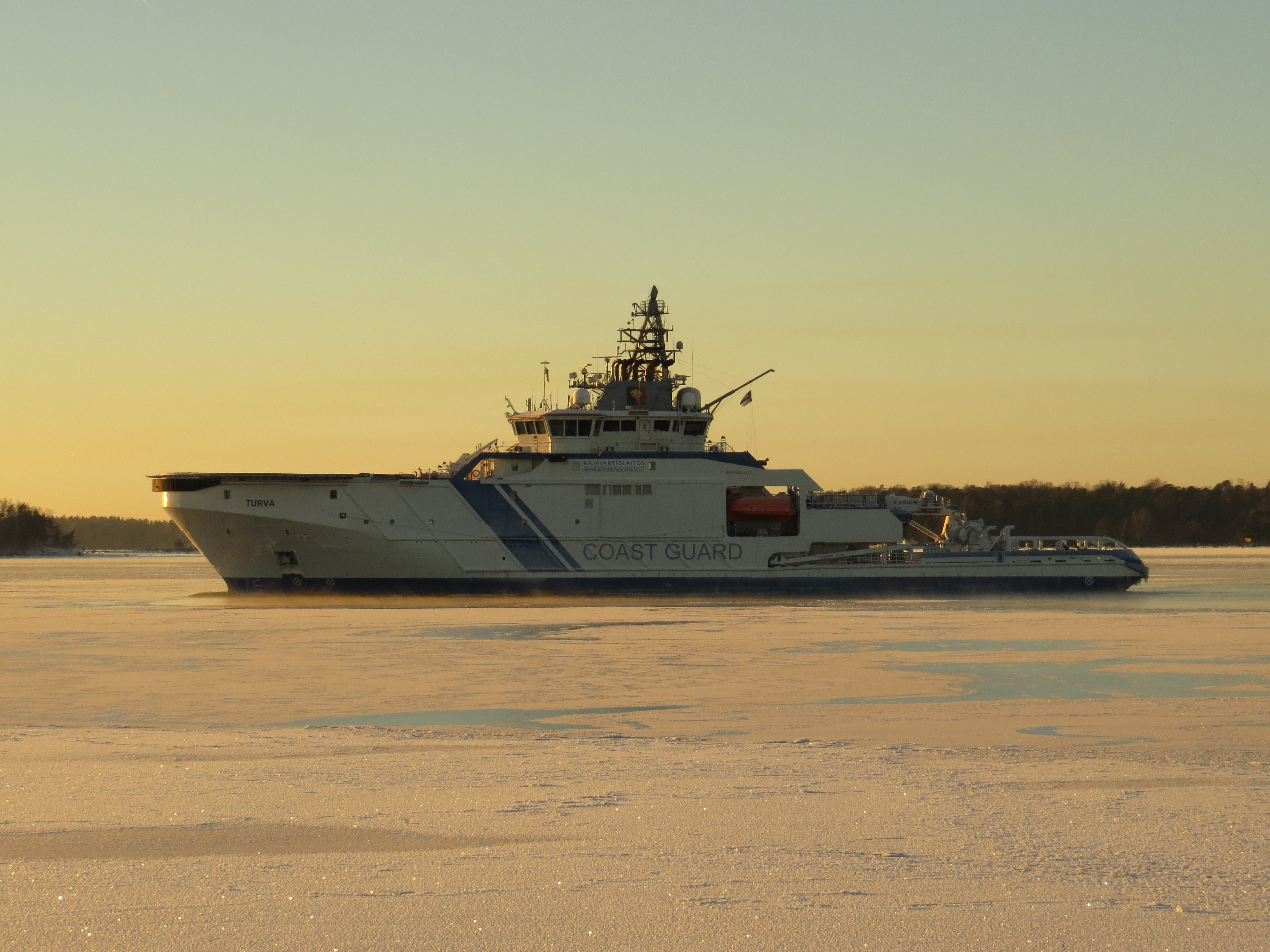 Suomen rajavartiolaitoksen vartiolaiva Turva Kotkan edustalla.